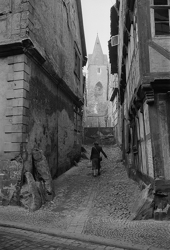 Original image description from the Deutsche Fotothek Quedlinburg. Blick durch eine Fachwerkgasse